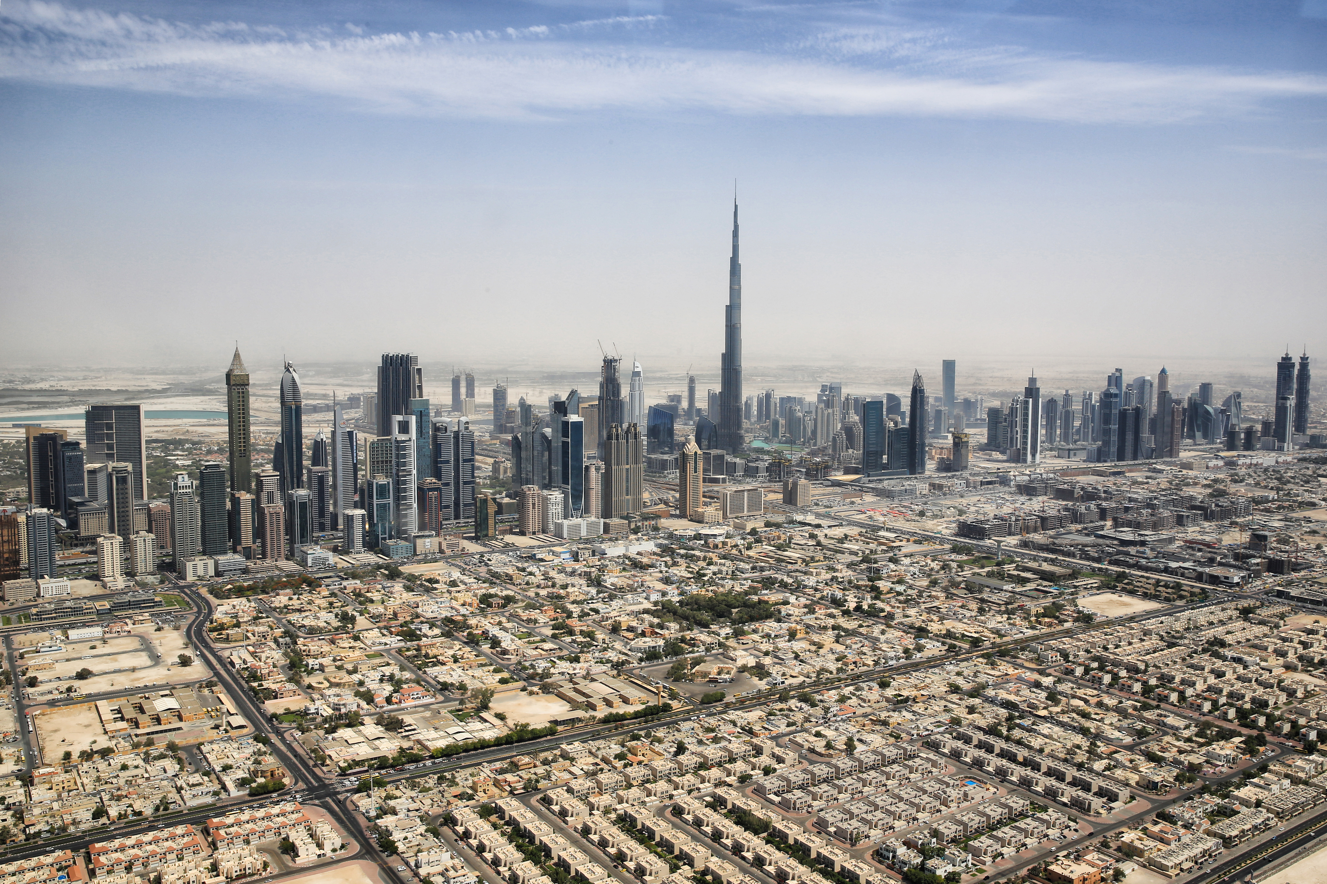 Dubai Skyline mit Burj Khalifa